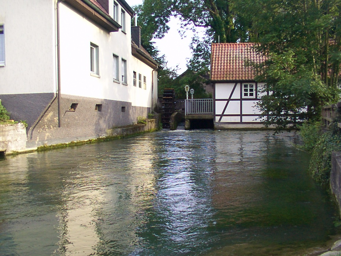 Der Fluss Heder, gespeist von einer Reihe von kleinen Karstquellen